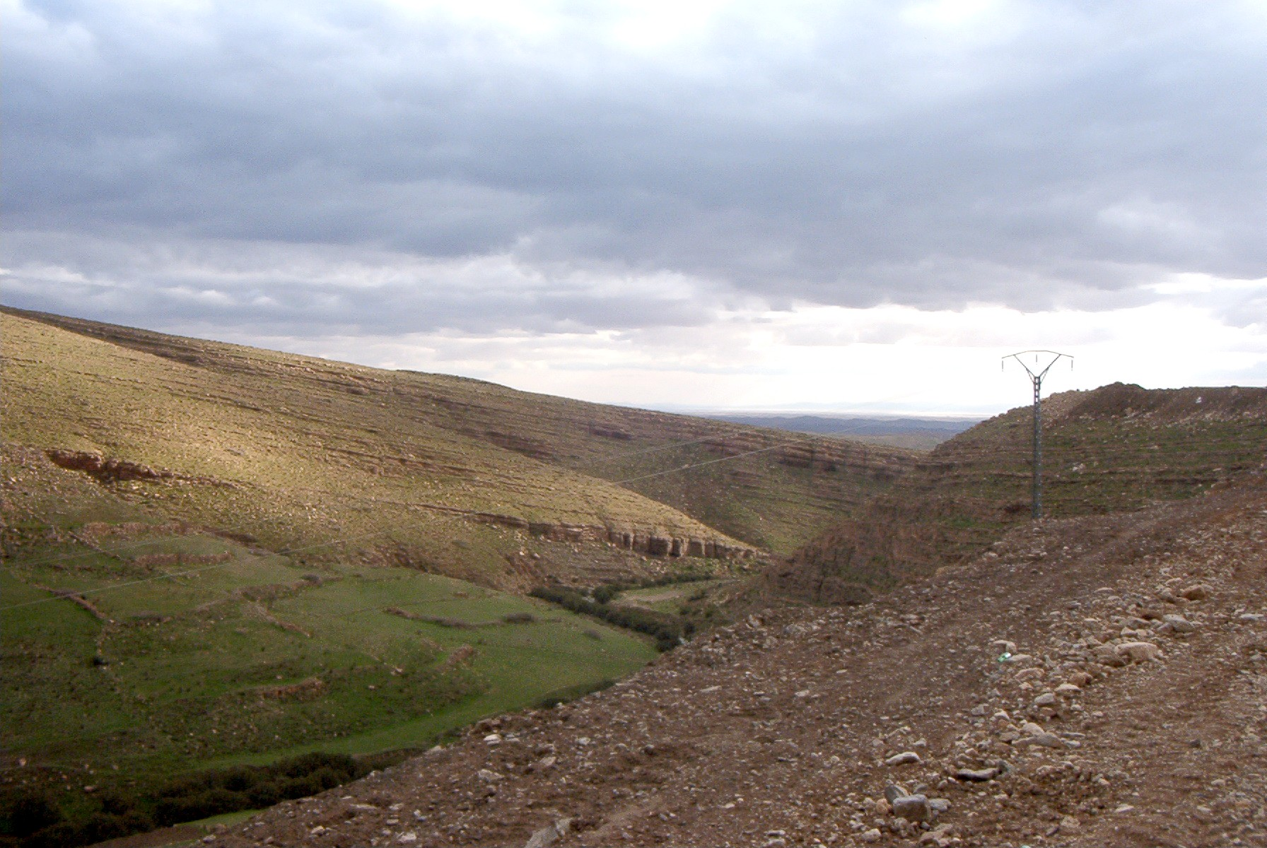 Voie d'accès à la Qalaâ des Beni Hammad le long de l'oued Fredj